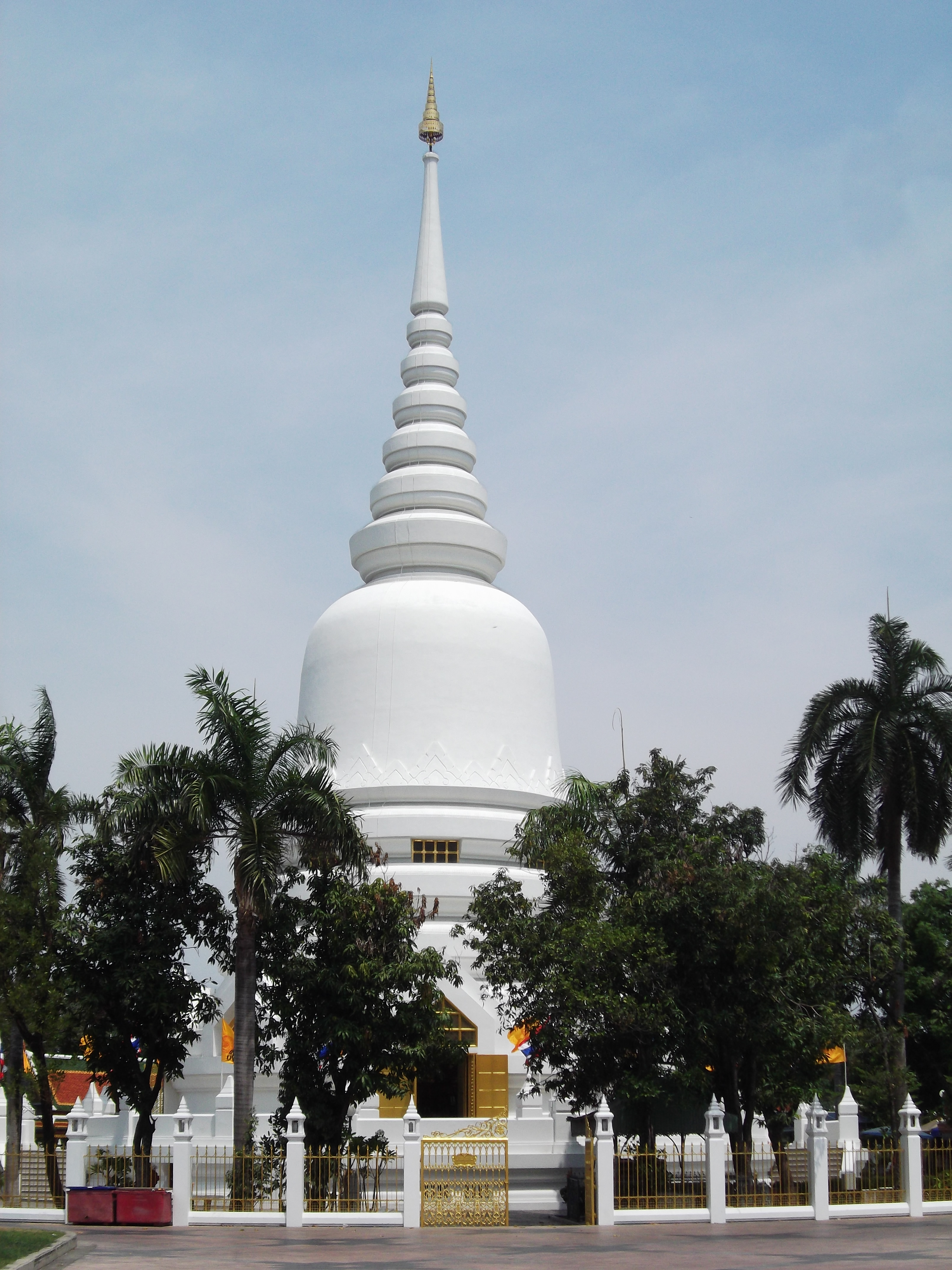 วัดพระศรีมหาธาตุวรมหาวิหาร